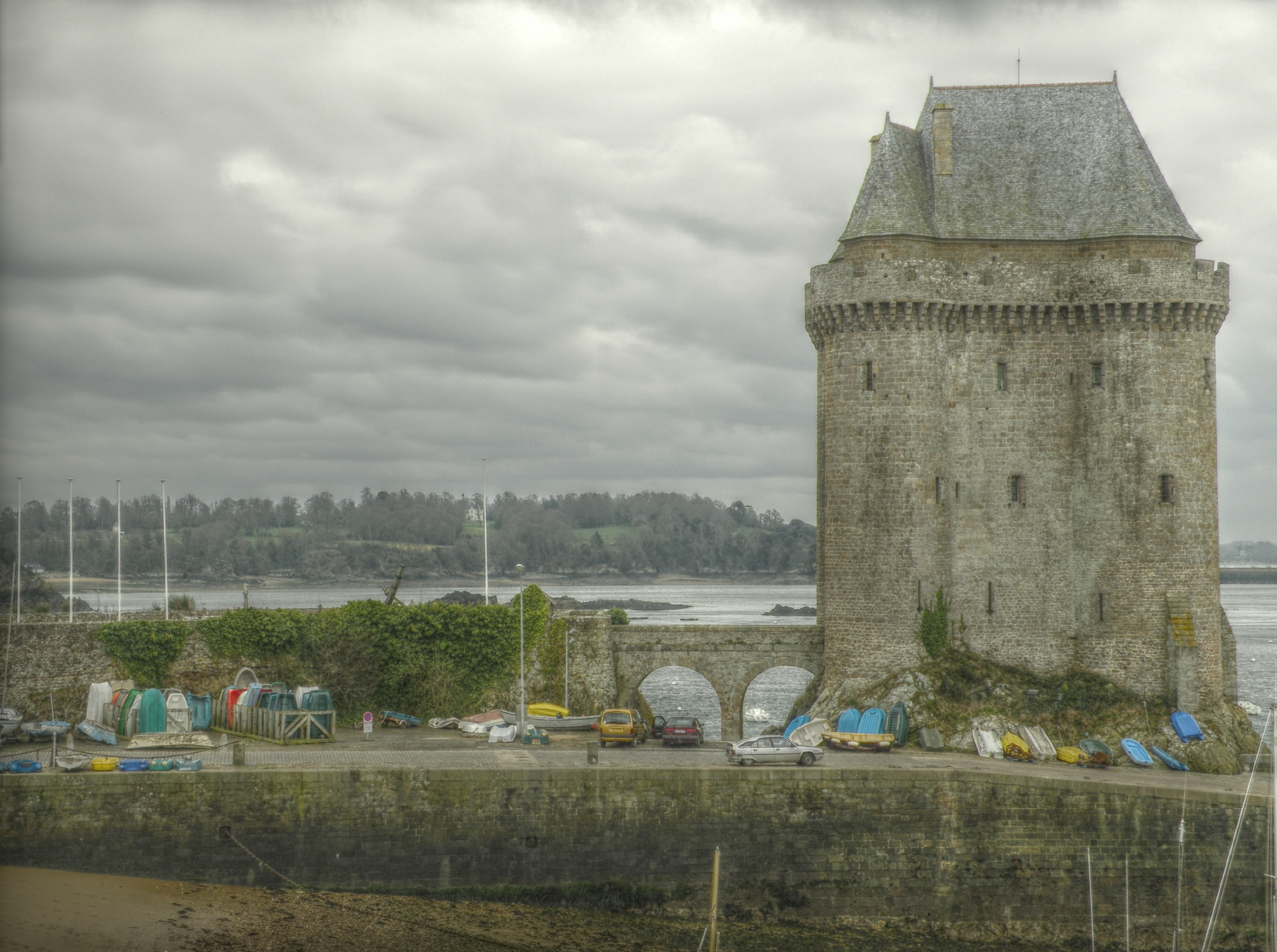 La tour Solidor dans le quartier de Saint-Servan-sur-Mer à Saint-Malo.